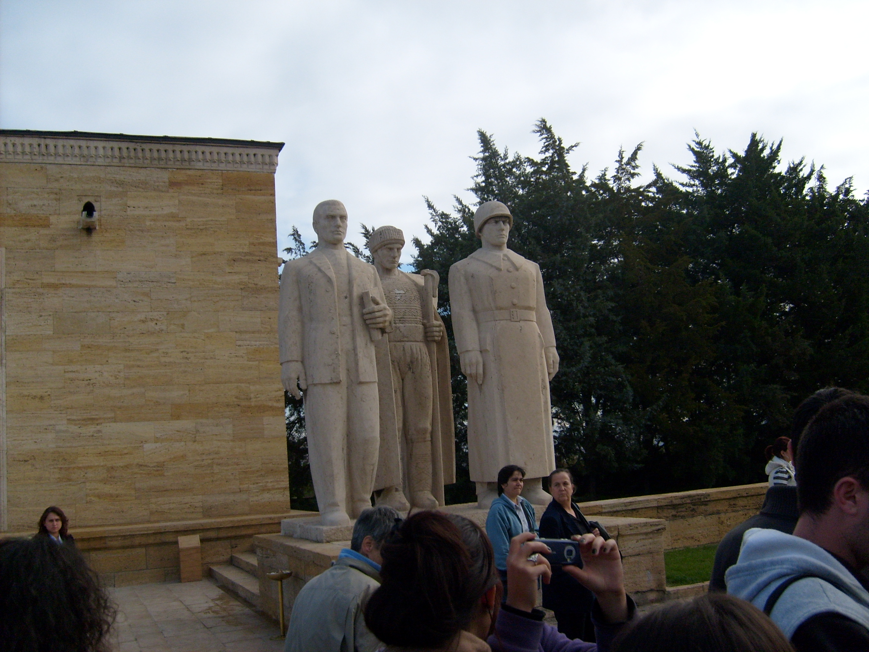 Ankara 3 Kasım 2007